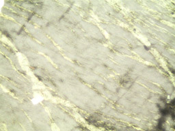 Imatge de l'albita a través d'un microscòpi petrogràfic